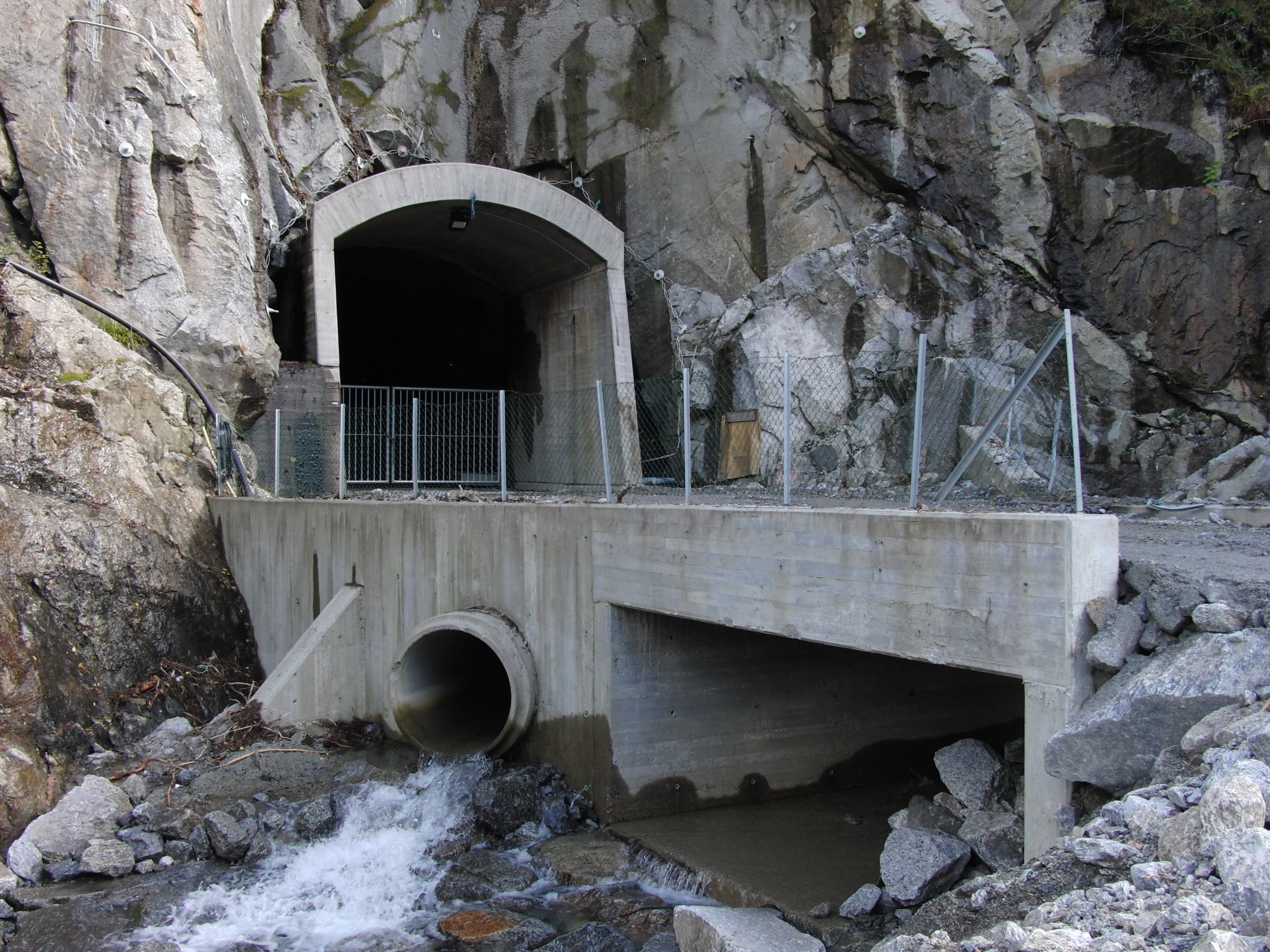 Sleveåne kraftverk